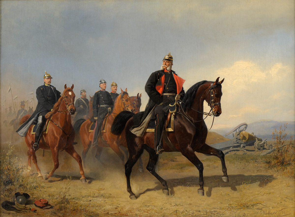 Kaiser Wilhelm I, Graf von Bismarck, von Moltke, Kriegsminister von Roon, Leopold von Hohenzollern und Ulanen auf dem Weg zur Frontinspektion. Signiert. Datiert 1872. Öl auf Leinwand, 66 x 90 cm. Provenienz: Auktion Christie´s New York, 1988, Lot 140.